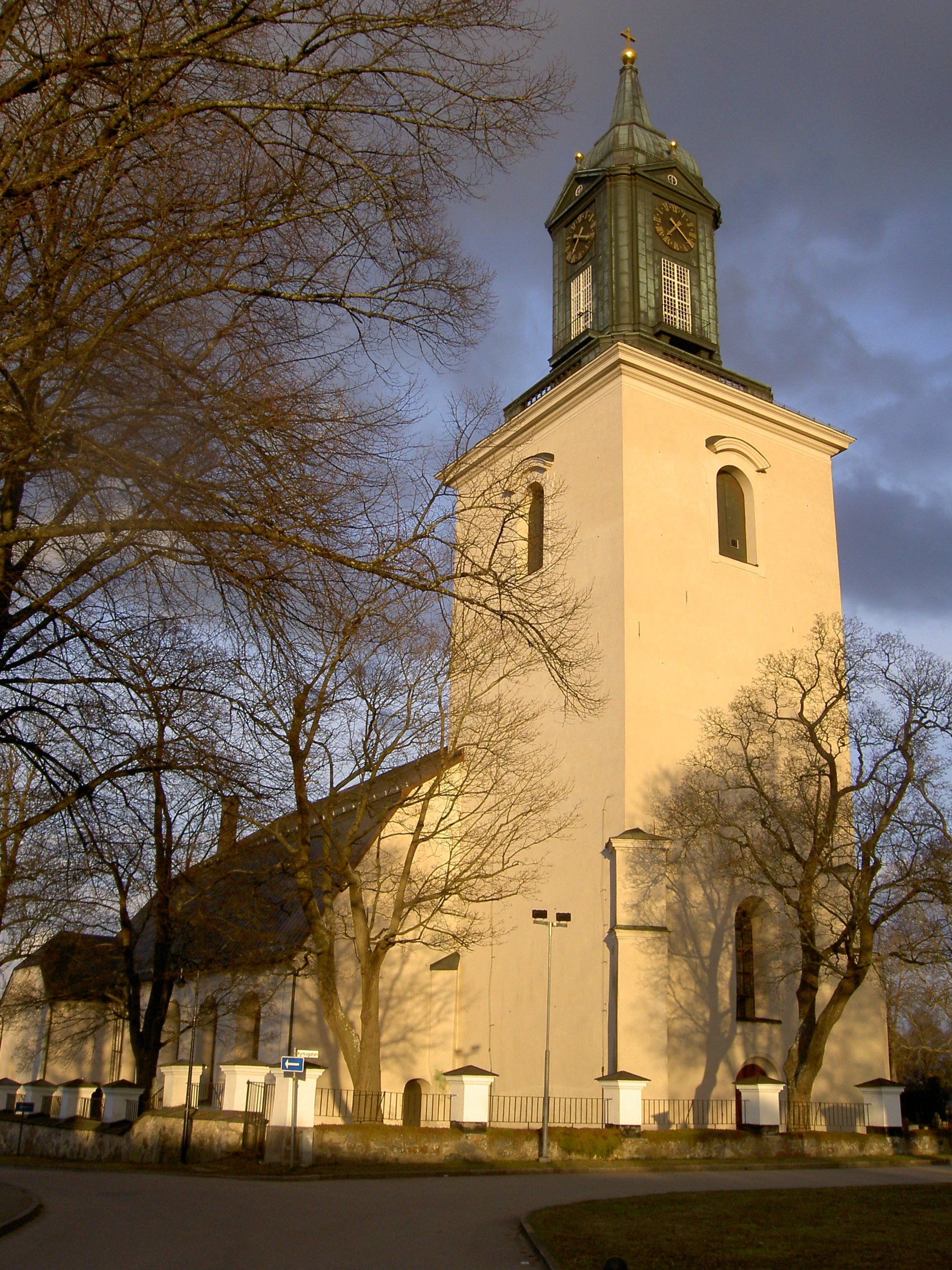 Hedemora kyrka, Hedemora, Sverige/Sweden